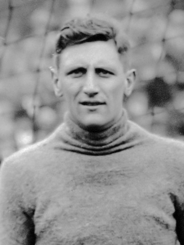 Doelman Gejus van der Meulen (met mascotte Het Konijn) speelde zijn 25ste interland. Zwitserland - Nederland (2-1), gespeeld op 6 mei 1928 op het terrein van de FC Nordstern (Sportplatz Rankhof) te Basel. 6 mei 1928